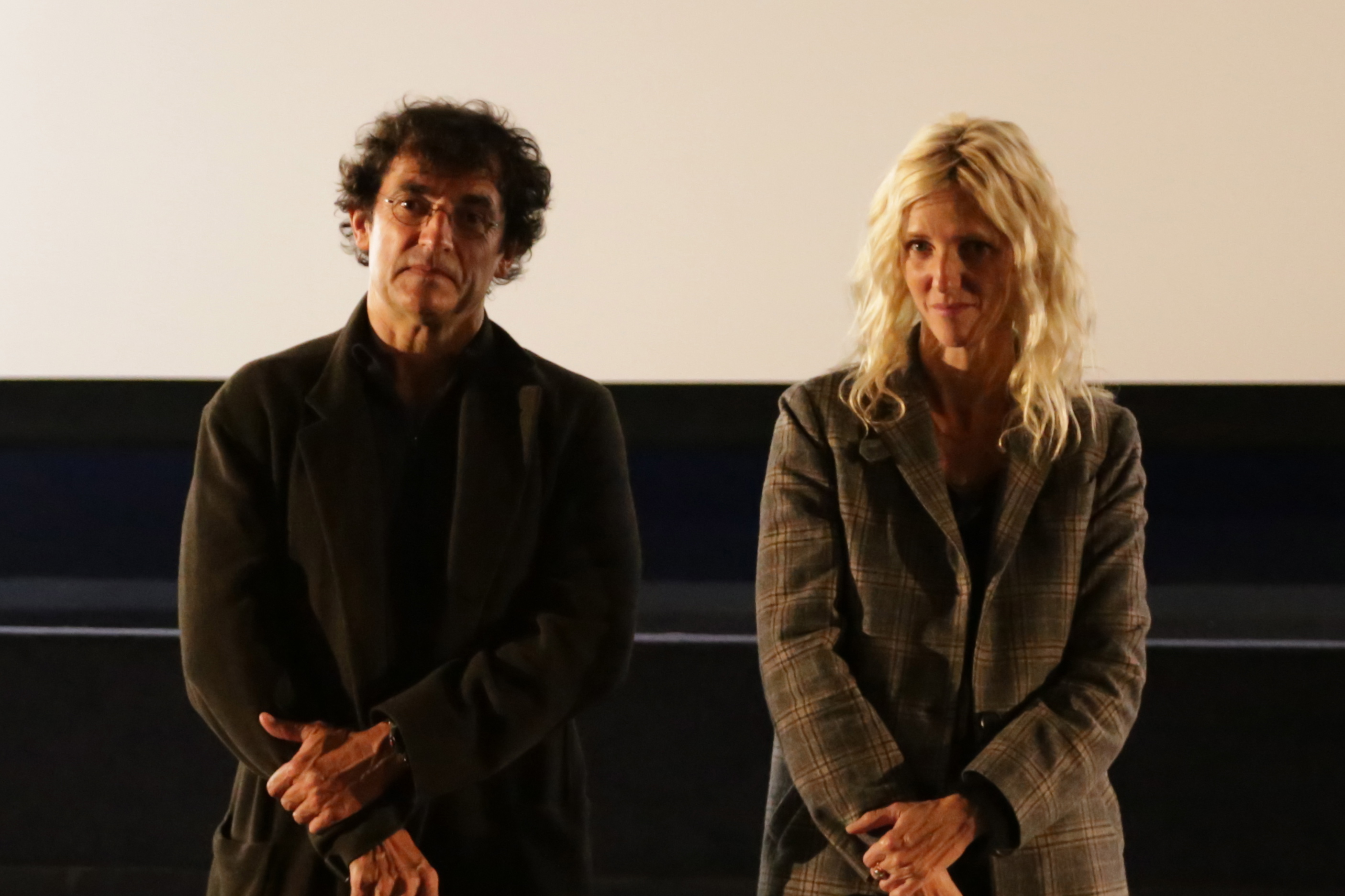 Lors de l'avant première du film Neuf Mois Ferme, à Lyon le 17/09/2013